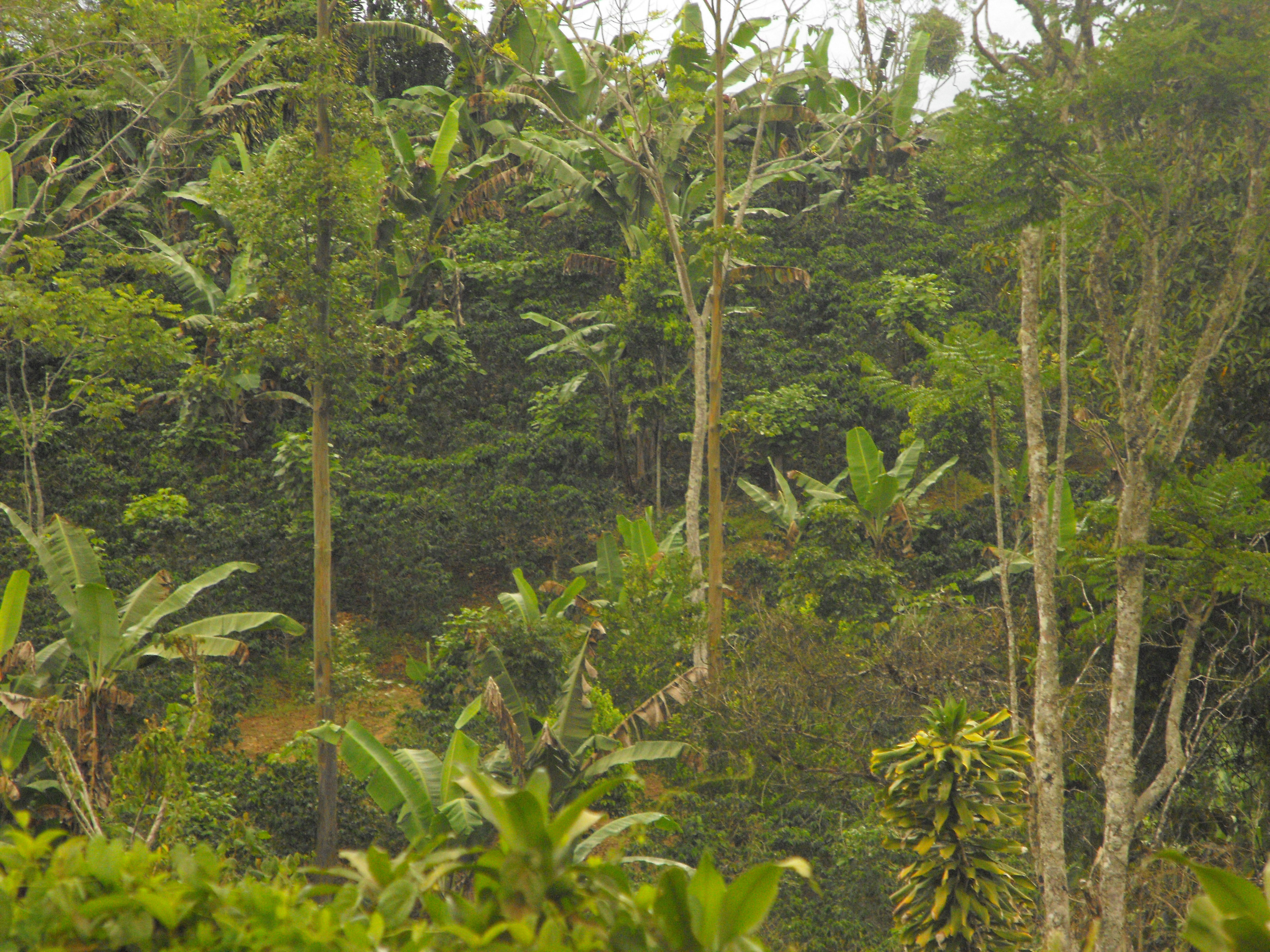 plantacion de cafe